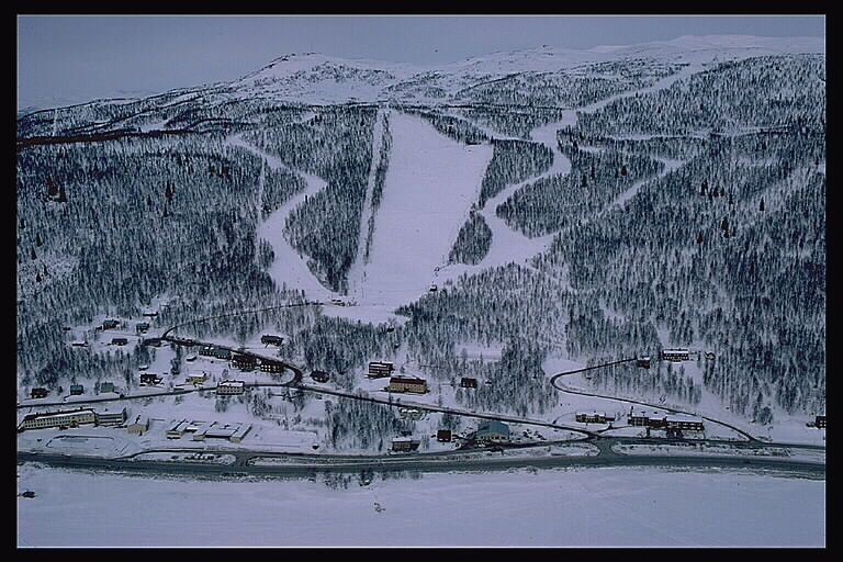 Skidbacke. Bilden troligen från slutet av 1970-talet.; Fjällbygd; Miljöer; Odlingslandskap